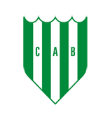 escudo banfield